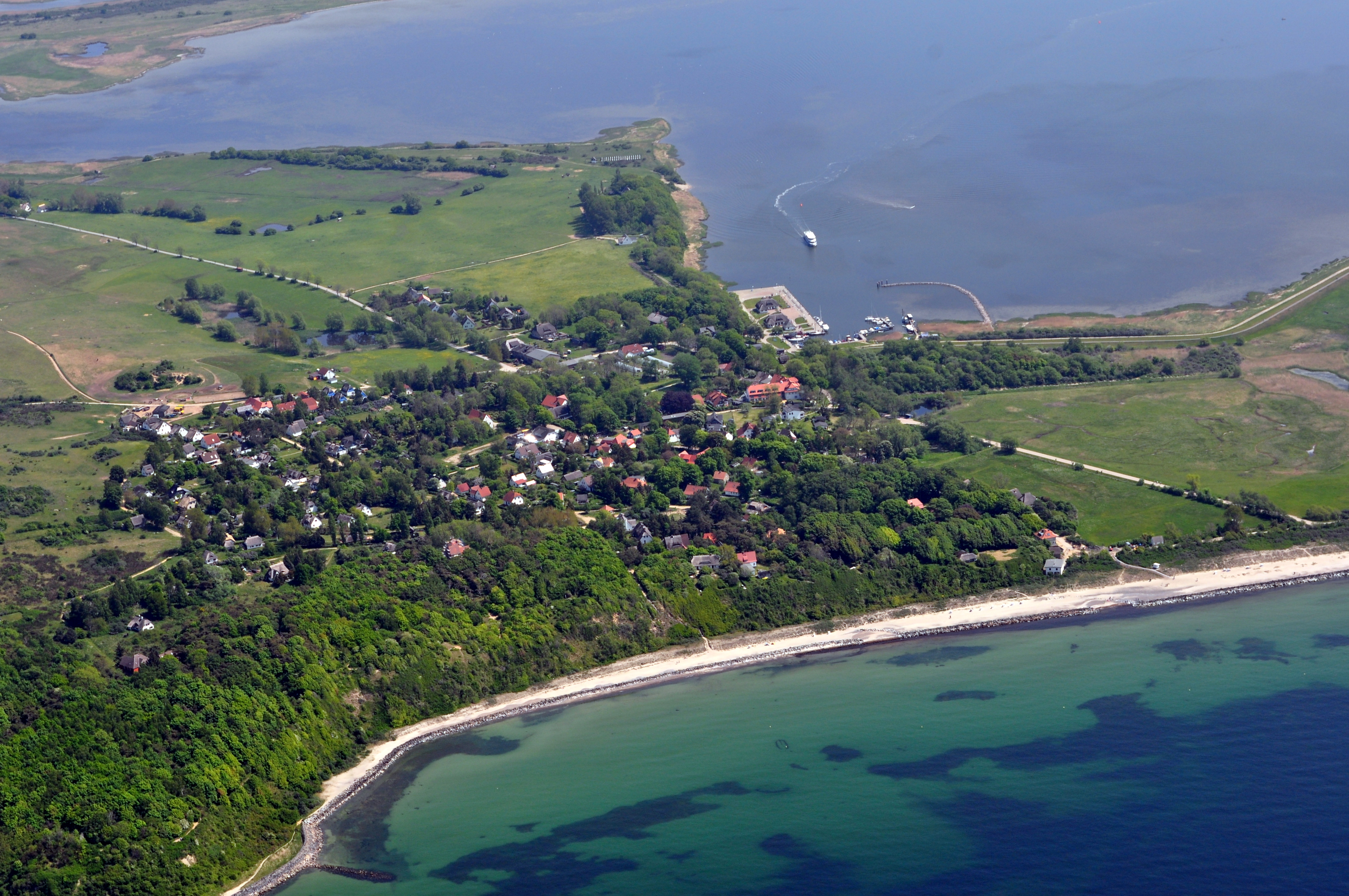 Die Bilder wurden von mir während eines einstündigen Rundflugs ab Flugplatz Güttin am 21. Mai 2011 aufgenommen. Die Bildbeschreibung steht im Dateinamen. Aufgenommen mit einer Nikon D5000 durch das Seitenfenster des Flugzeugs.